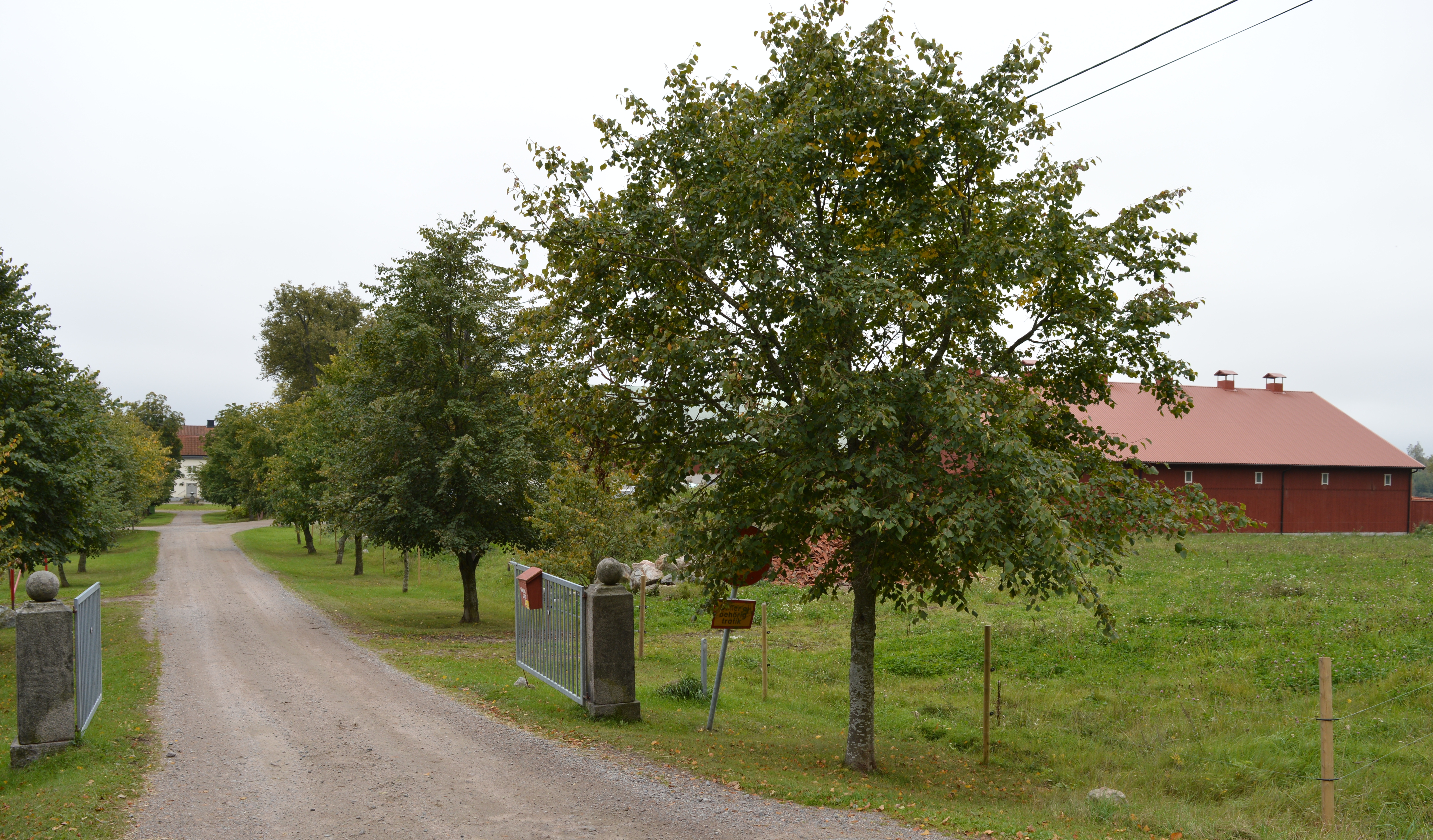 Närsjö gård belägen omedelbart söder om Dalhagen i Eskilstuna kommun.